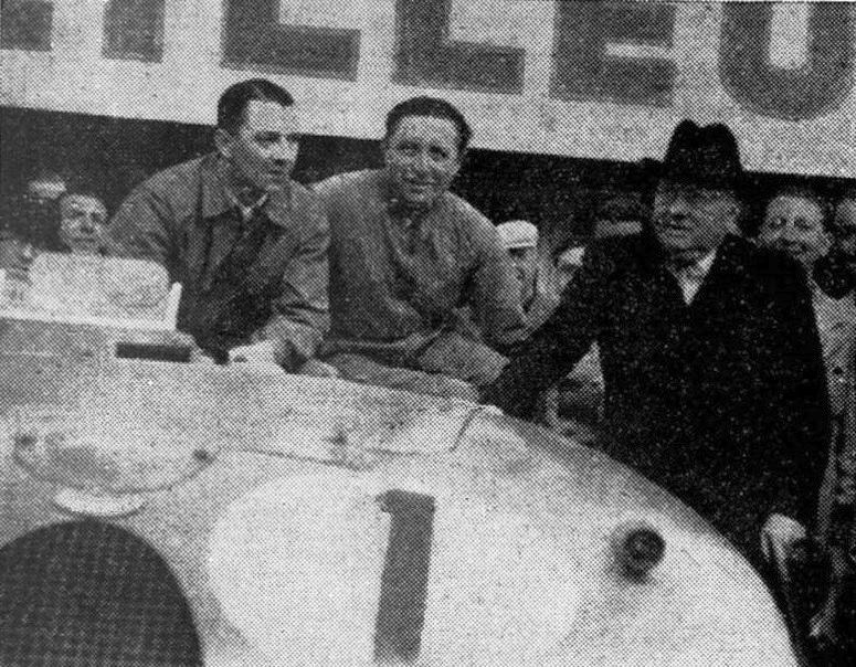 24 Heures du Mans 1939, Wimille et Veyron à côté du ministre de Monzie.